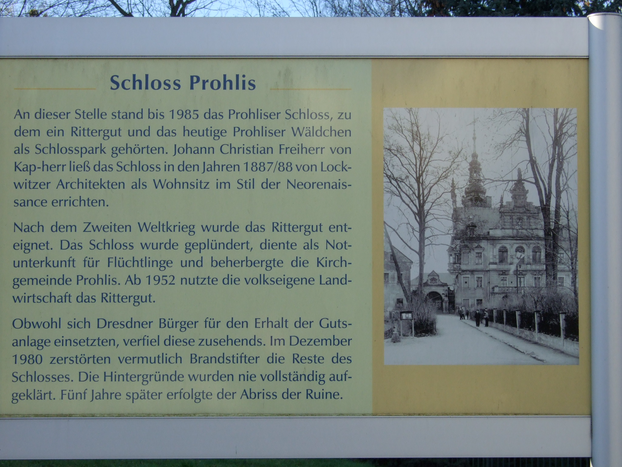 heutige Hinweistafel an der Stelle, wo das Prohliser Schloss stand